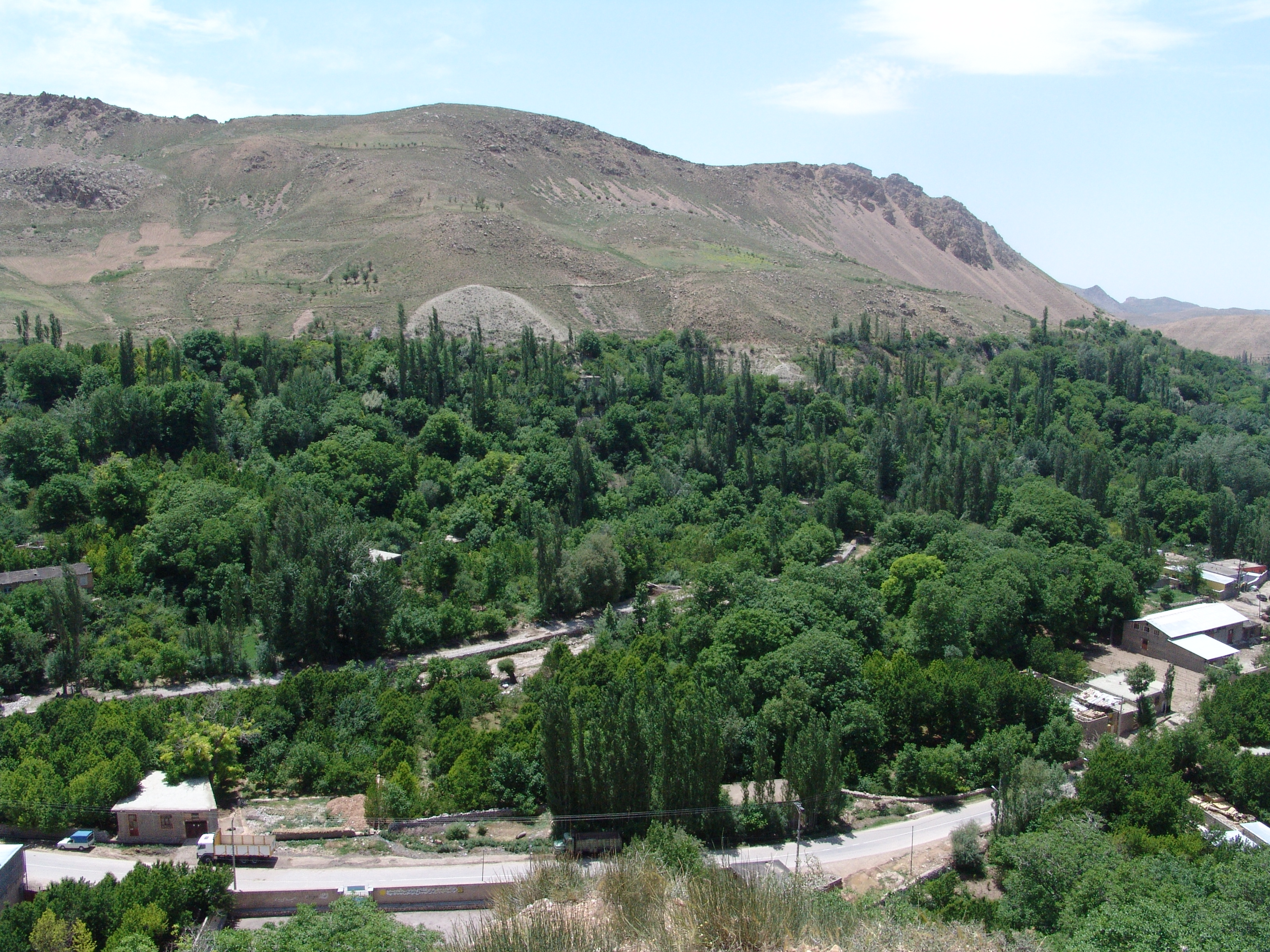 تصویر زیبایی از روستای روئین عکس از احمد نیک گفتار